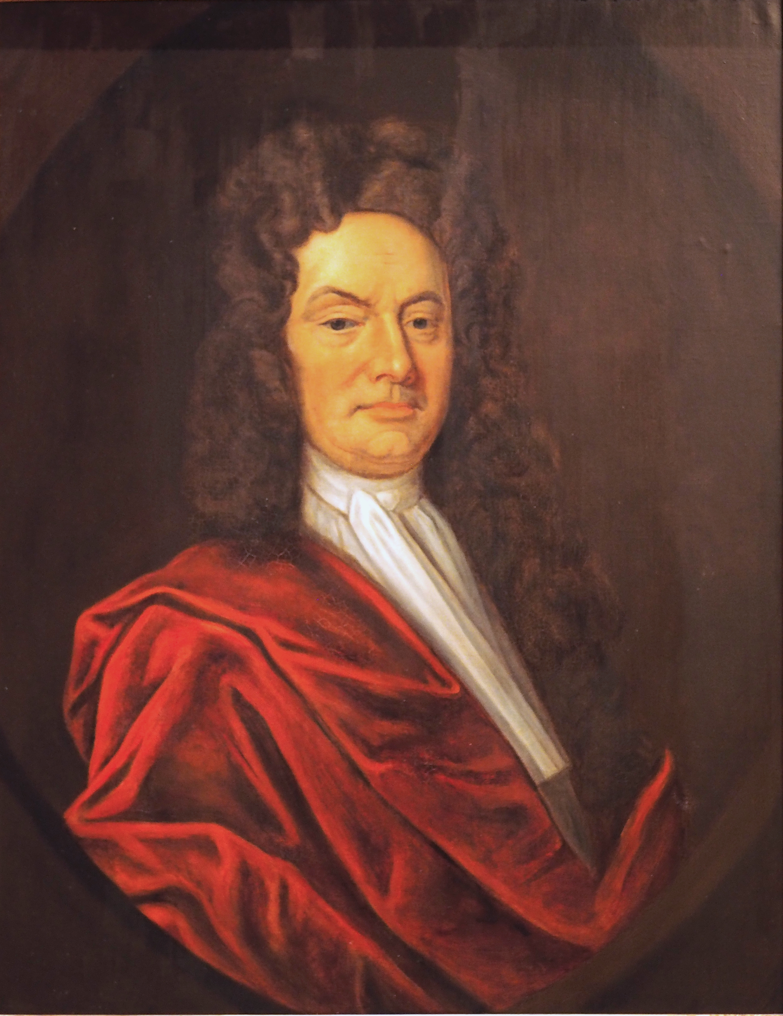 Andreas Gottlieb von Bernstorff (1649-1726), Leitender Minister, Kanzler Herzog Georg Wilhelms